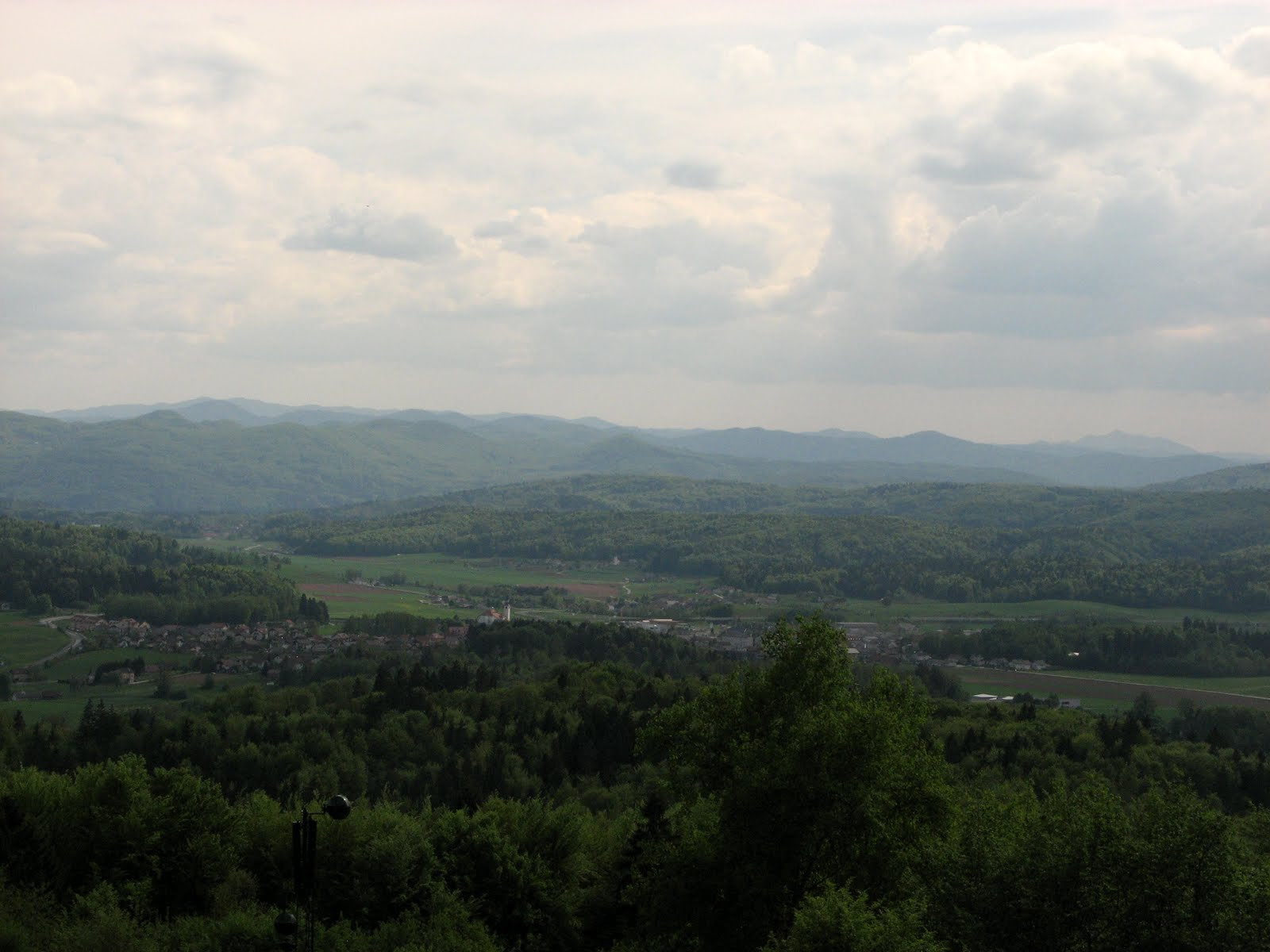 Ivančna Gorica